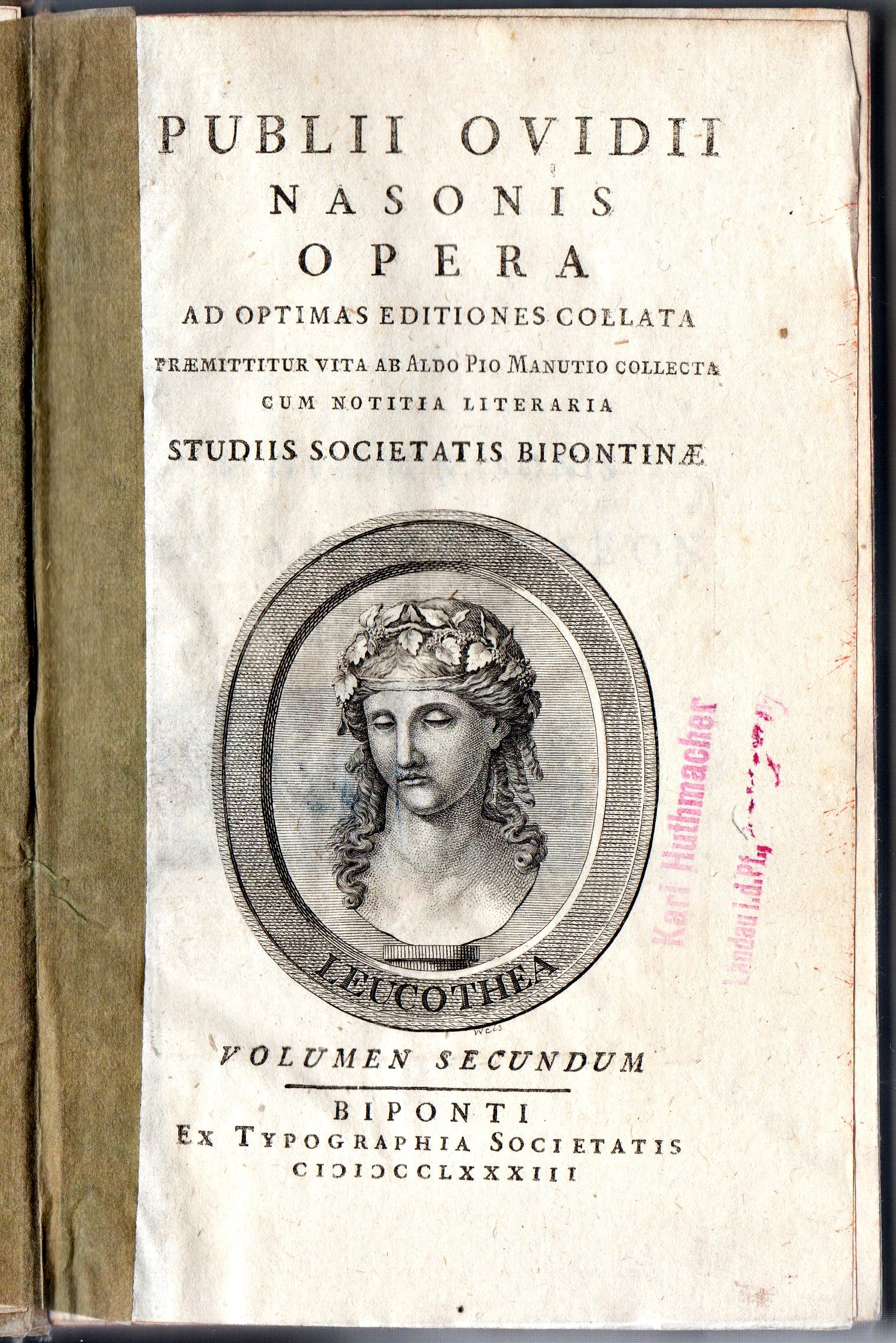 Titelblatt einer Societas Bipontina Ausgabe, 1783 (eigener Scan vom eigenen alten Buch)